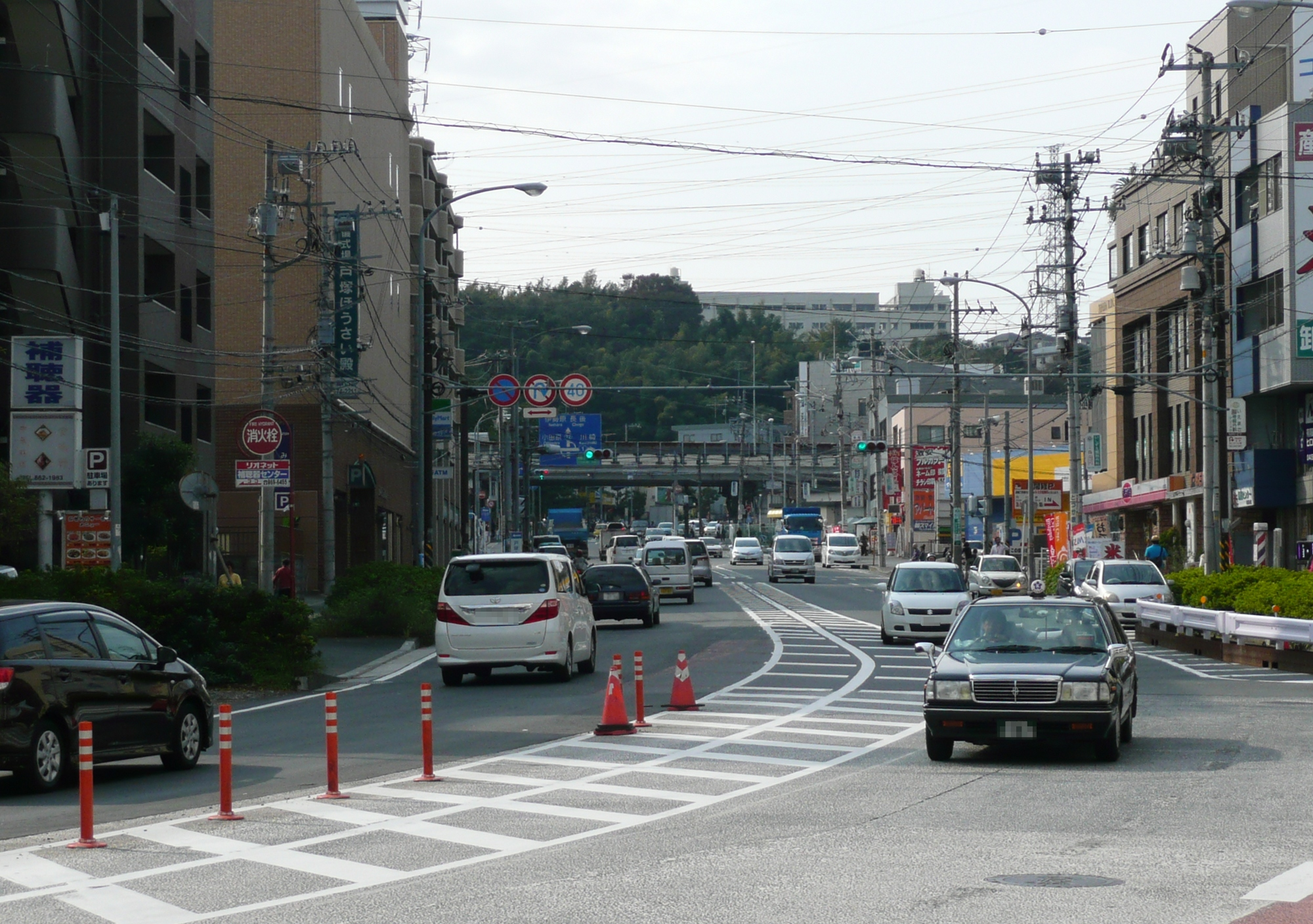 神奈川県道22号横浜伊勢原線（戸塚駅付近）